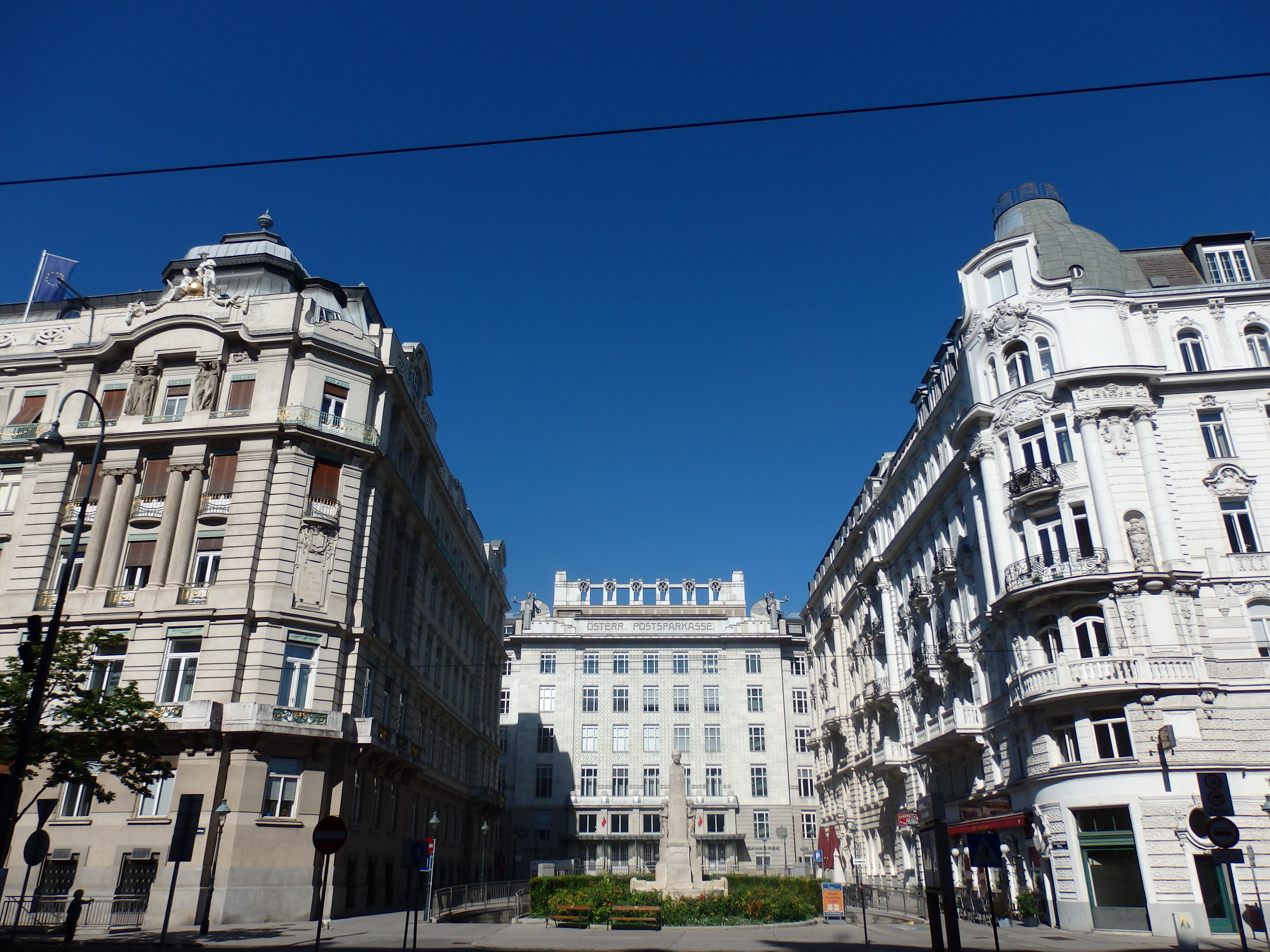 Georg-Coch-Platz, vom Stubenring aus gesehen, Wien-Innere Stadt